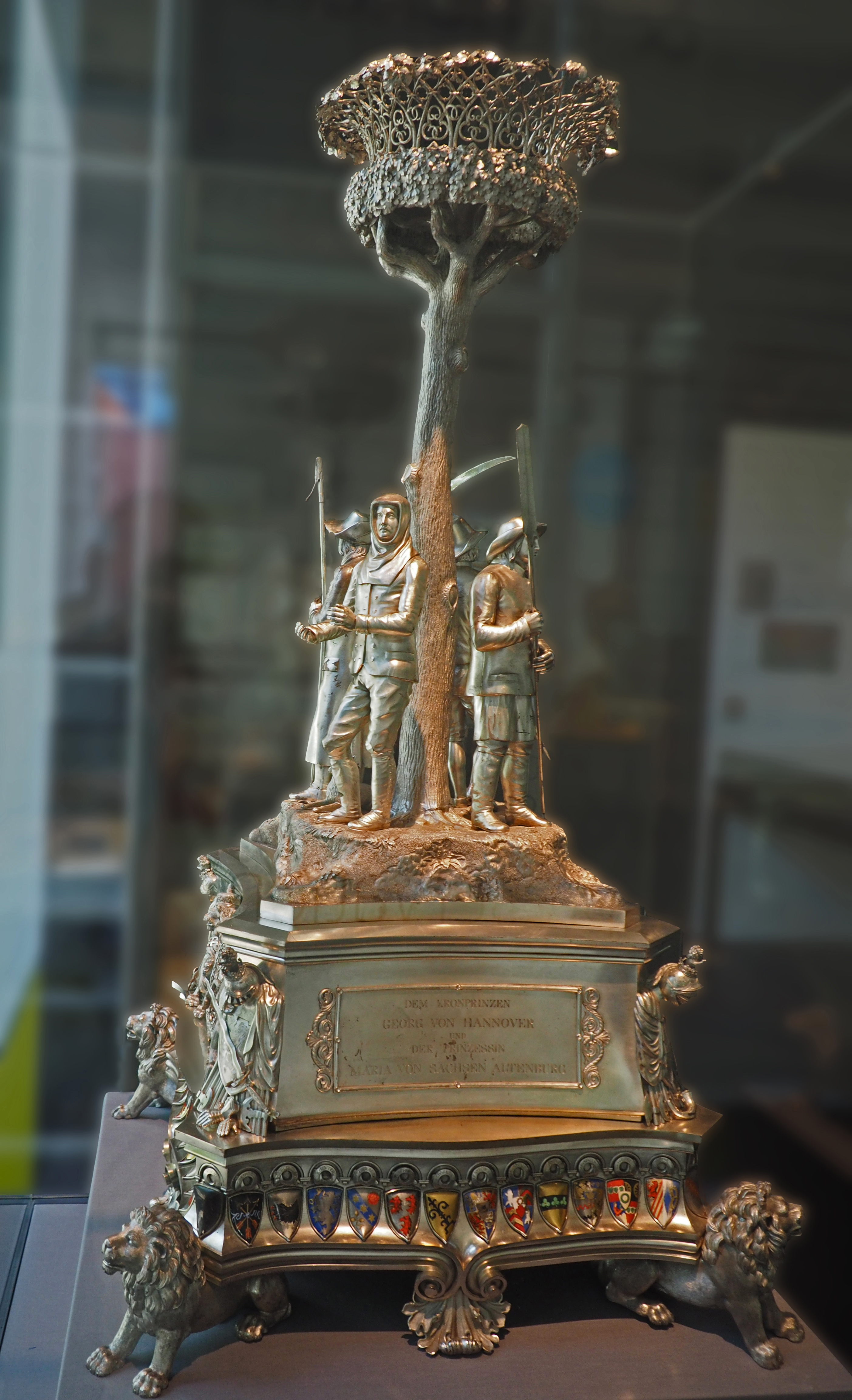 Tafelaufsatz (1843) für Kronprinz Georg von Hannover, Goldschmiede Knauer & Lameyer